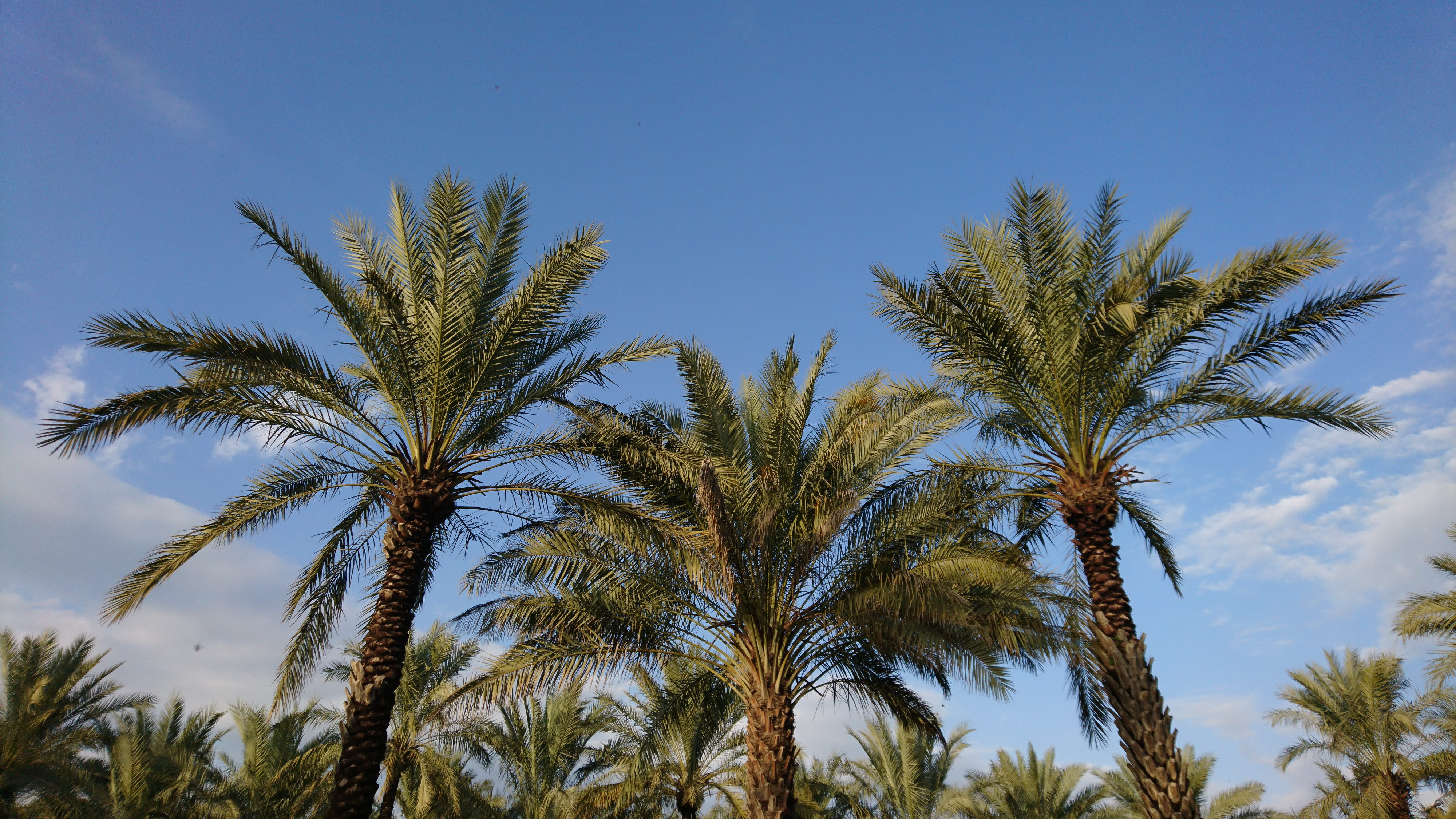 درخت خرمای کبکاب بهبهان